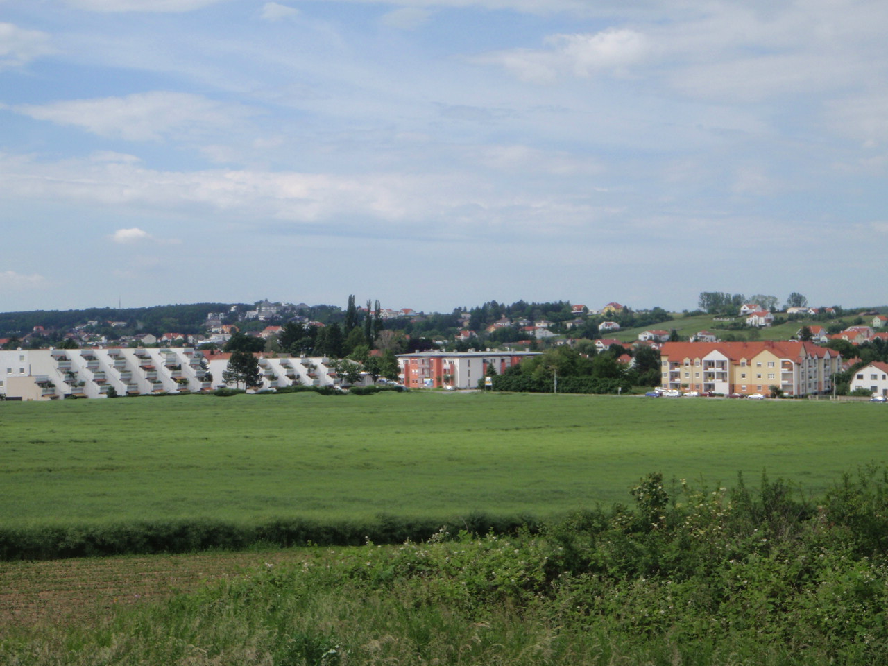 Oberpullendorf Blick nach Nord